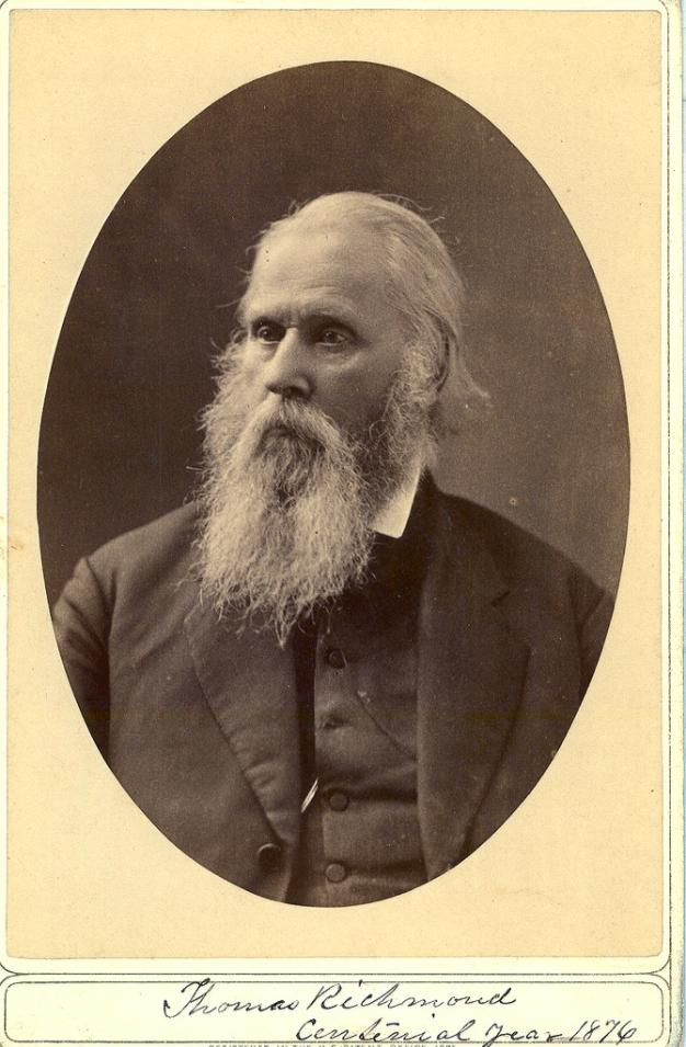 Thomas Richmond